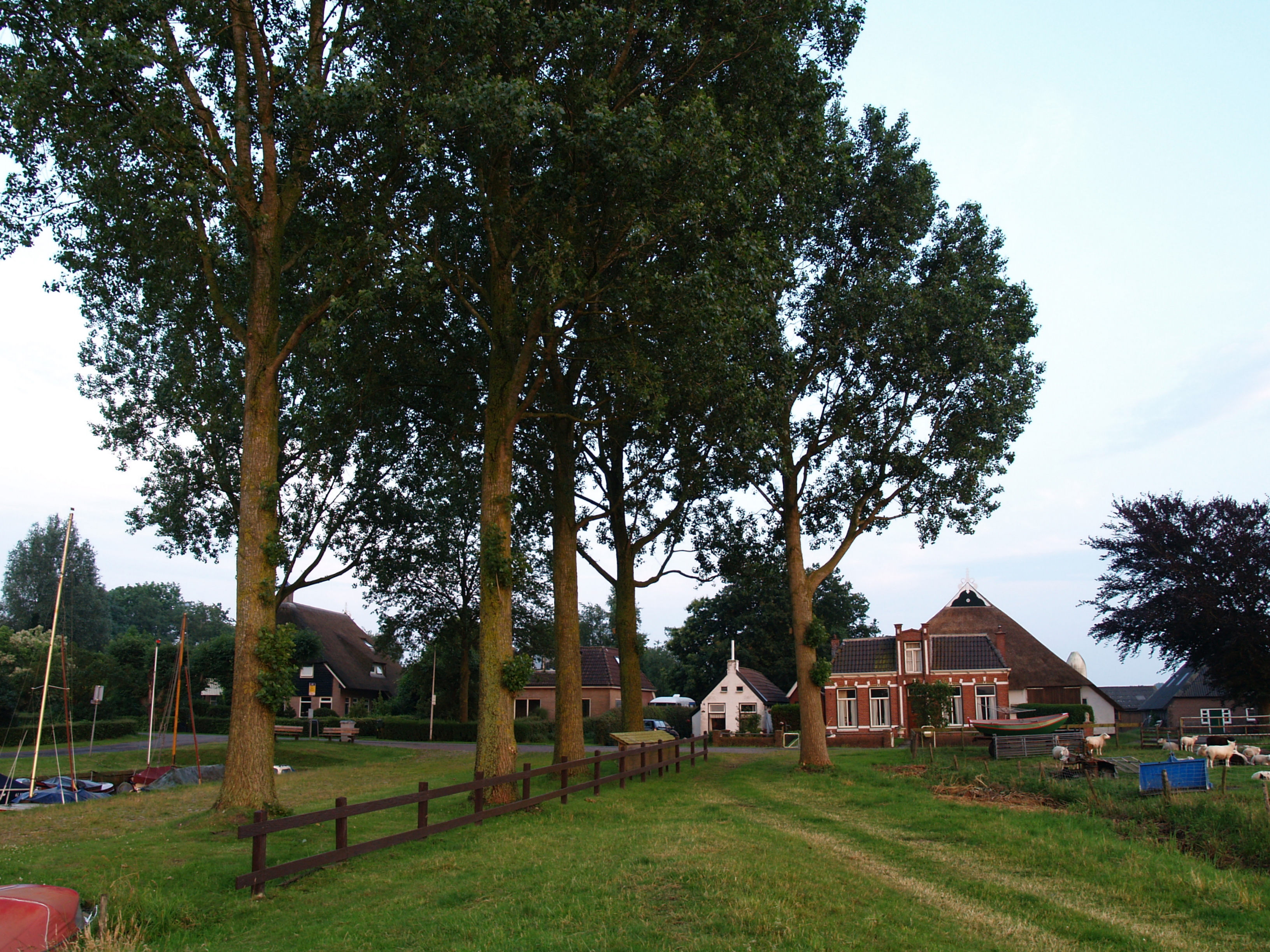 Haventje en EE